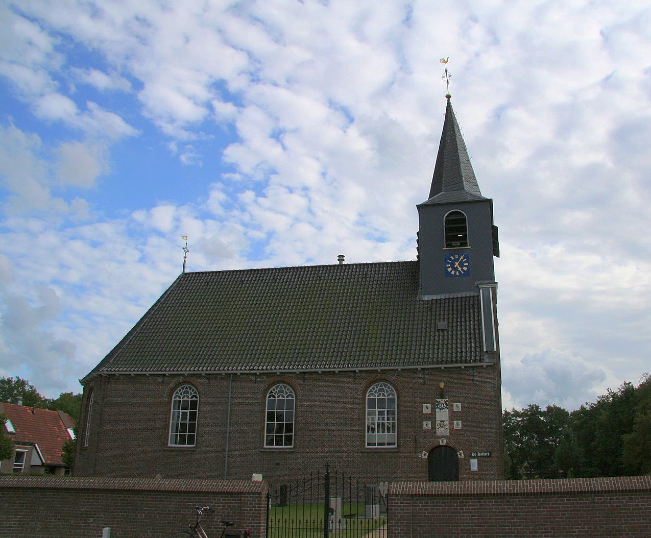 Aan de Rijksstraatweg staat de kerk van Hurdegaryp.